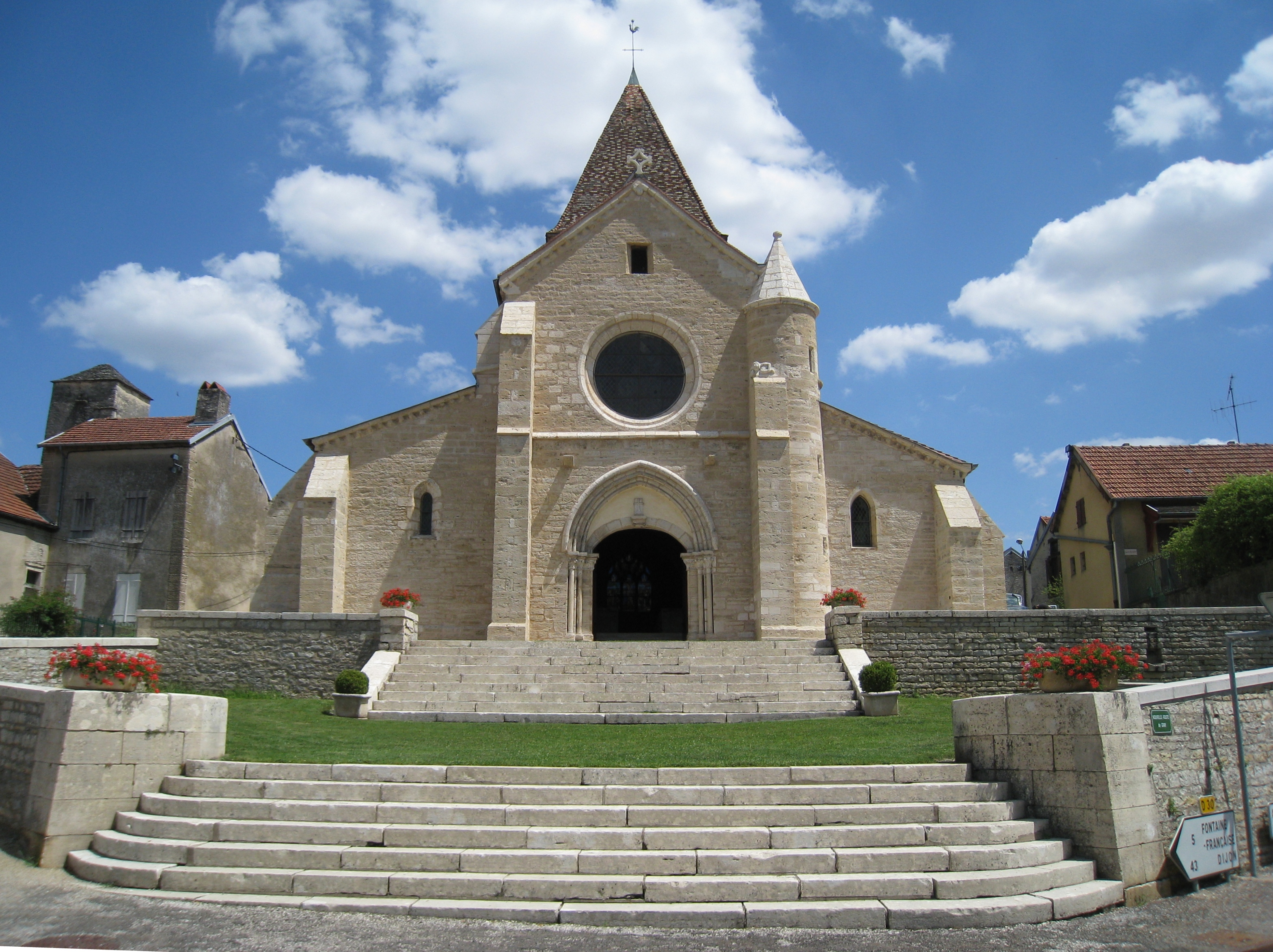 L'église de Saint-Seine sur Vingeanne, Côte d'Or, Bourgogne